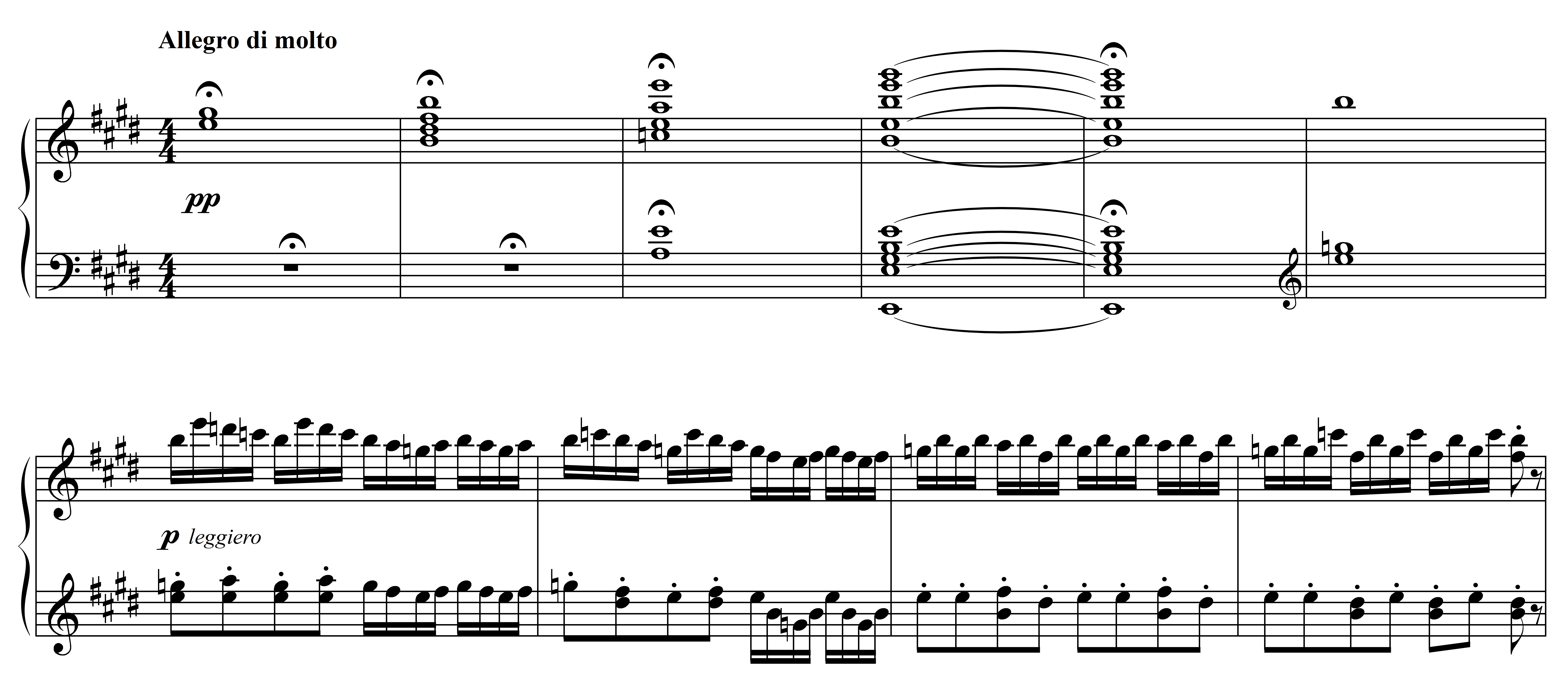 Notenbeispiel Mendelssohn - Sommernachtstraum, Ouvertüre (Klavier) T. 1-10